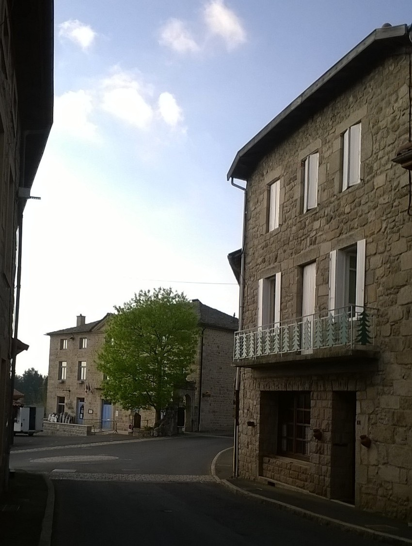 montregard14